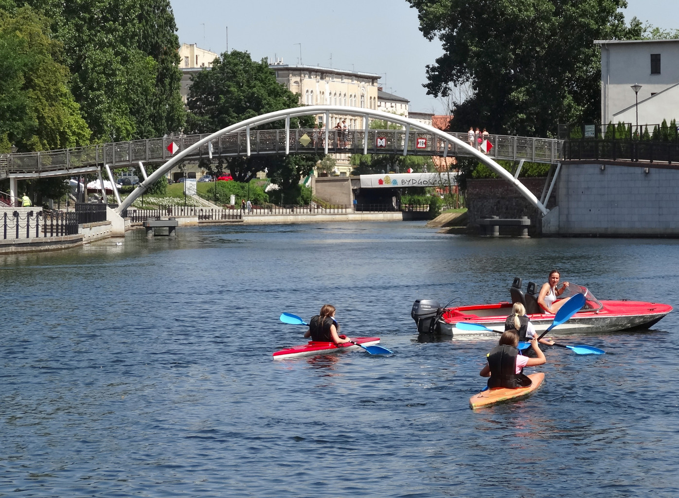 Kładka dla pieszych łącząca Wyspę Młyńską z Operą Nova i bulwarami nad Brdą